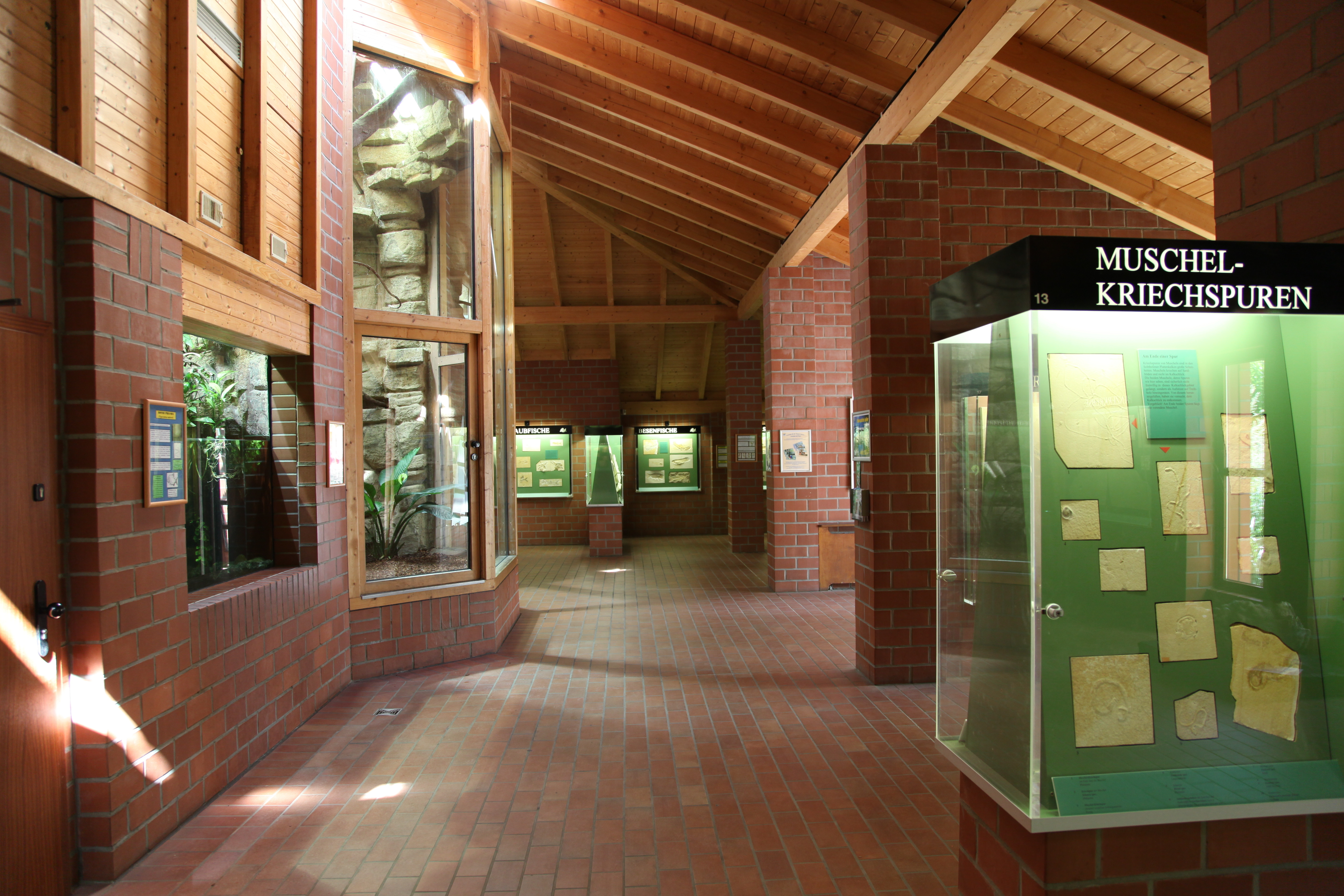 Fossilium im Tierpark an der Klinikstraße in Bochum